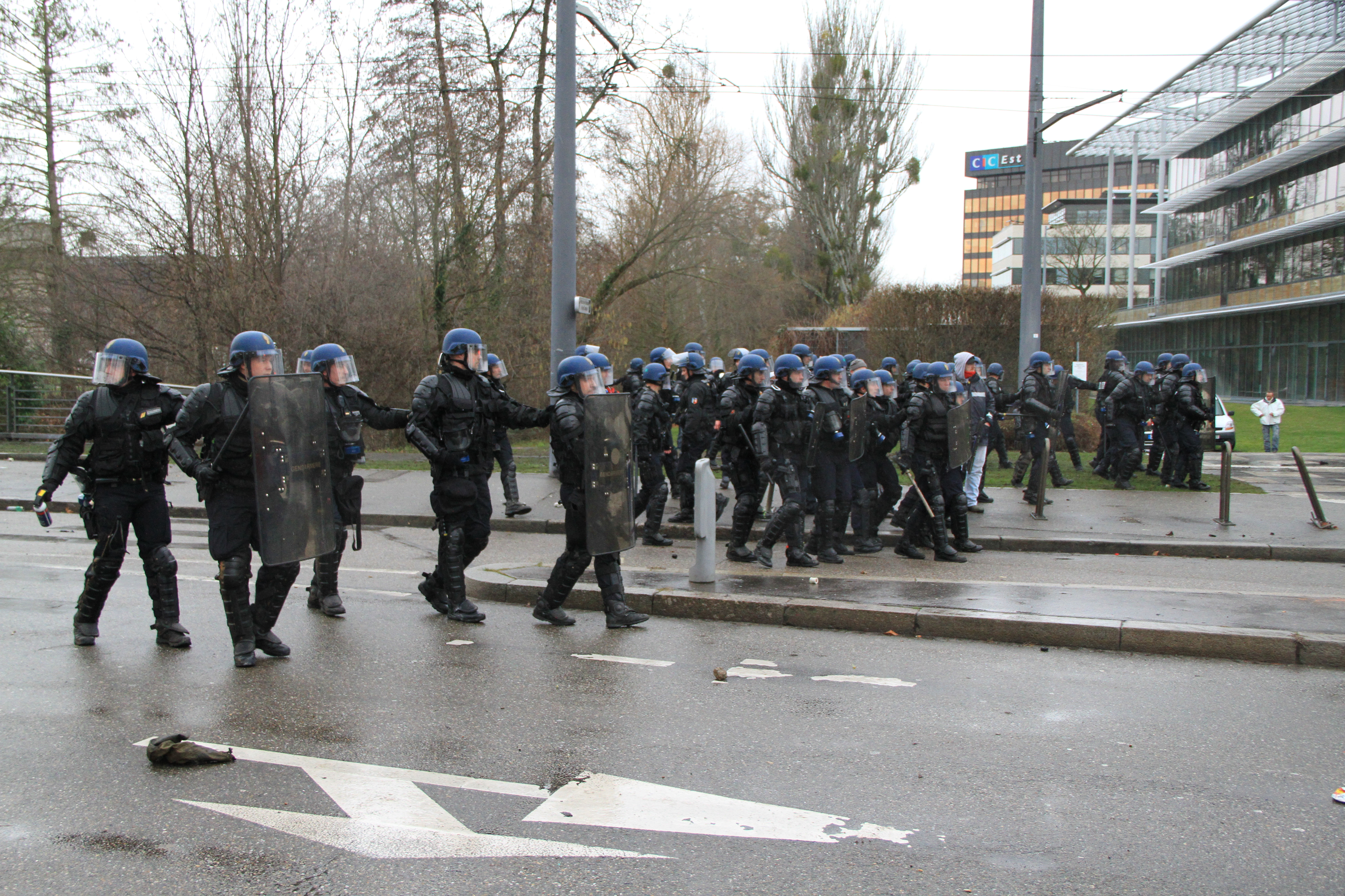 Strasbourg 6 février 2013, manifestations des ouvriers d’ArcelorMittal sur la place Adrien Zeller au Wacken.